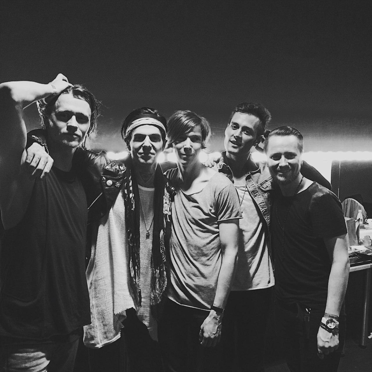 Группа Hospital и The Neighbourhood в GlavClub